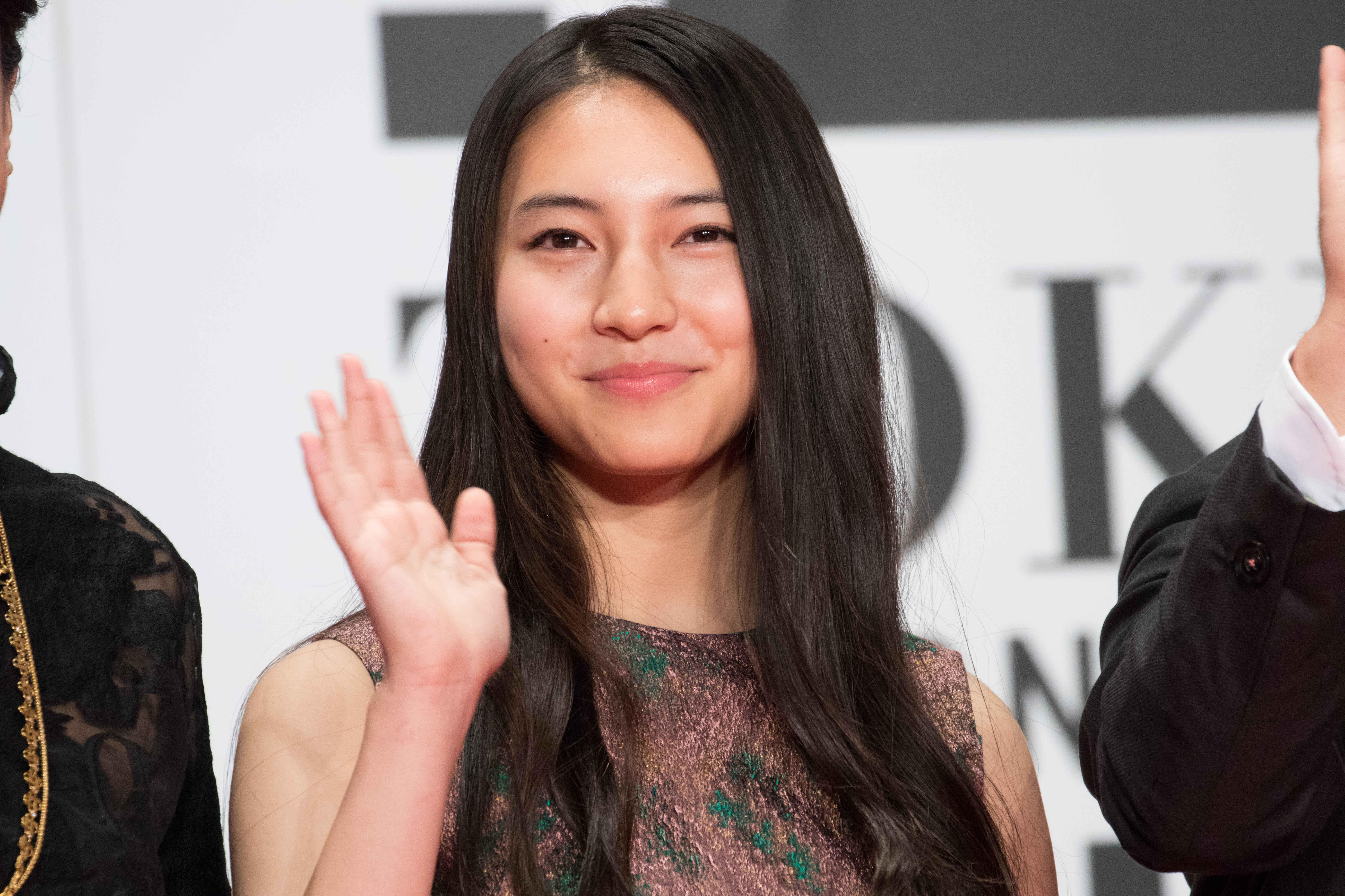 第29回 東京国際映画祭 オープニングセレモニー 久保田紗友 (ハローグッバイ)